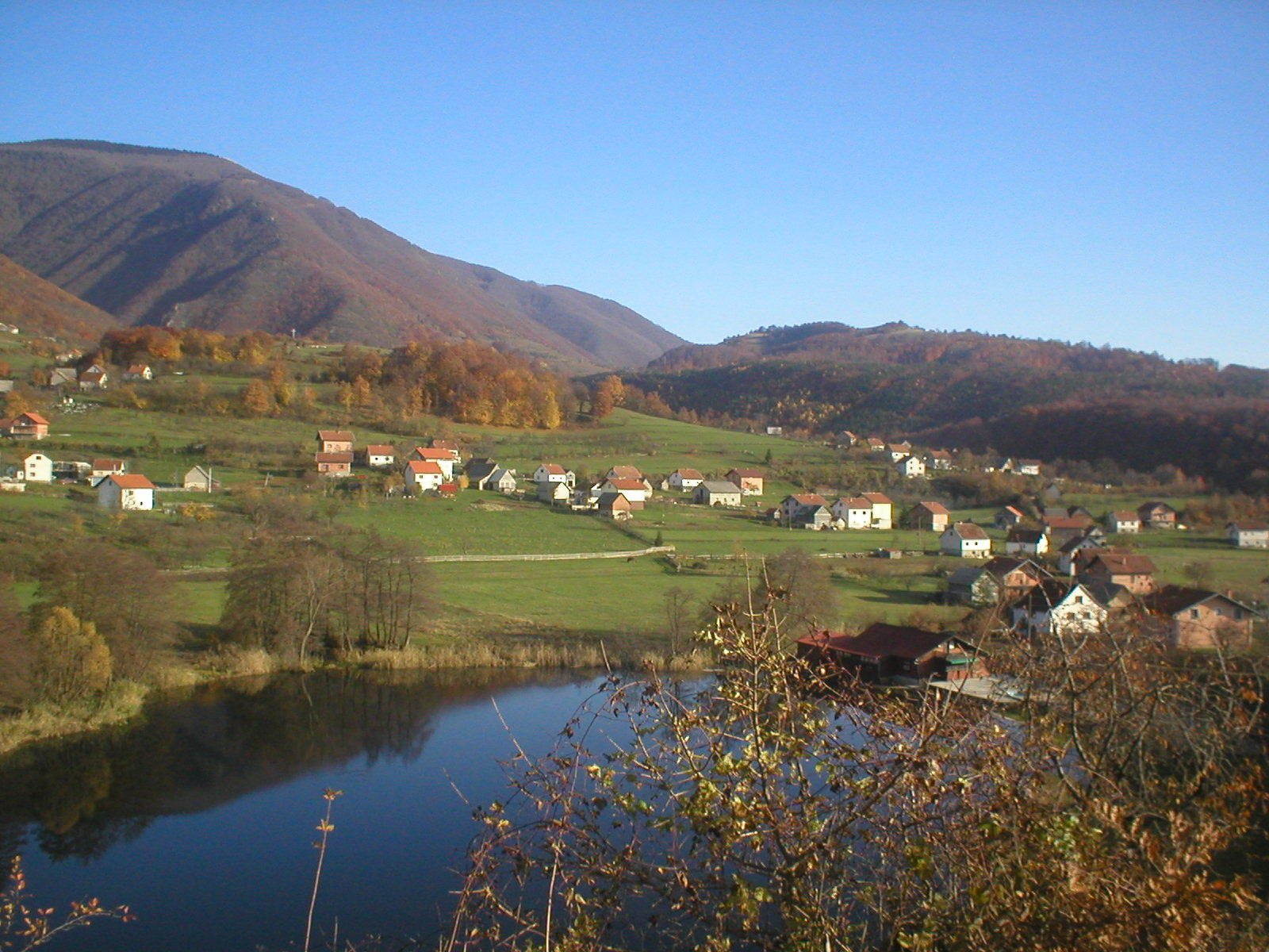 Ždrimačko